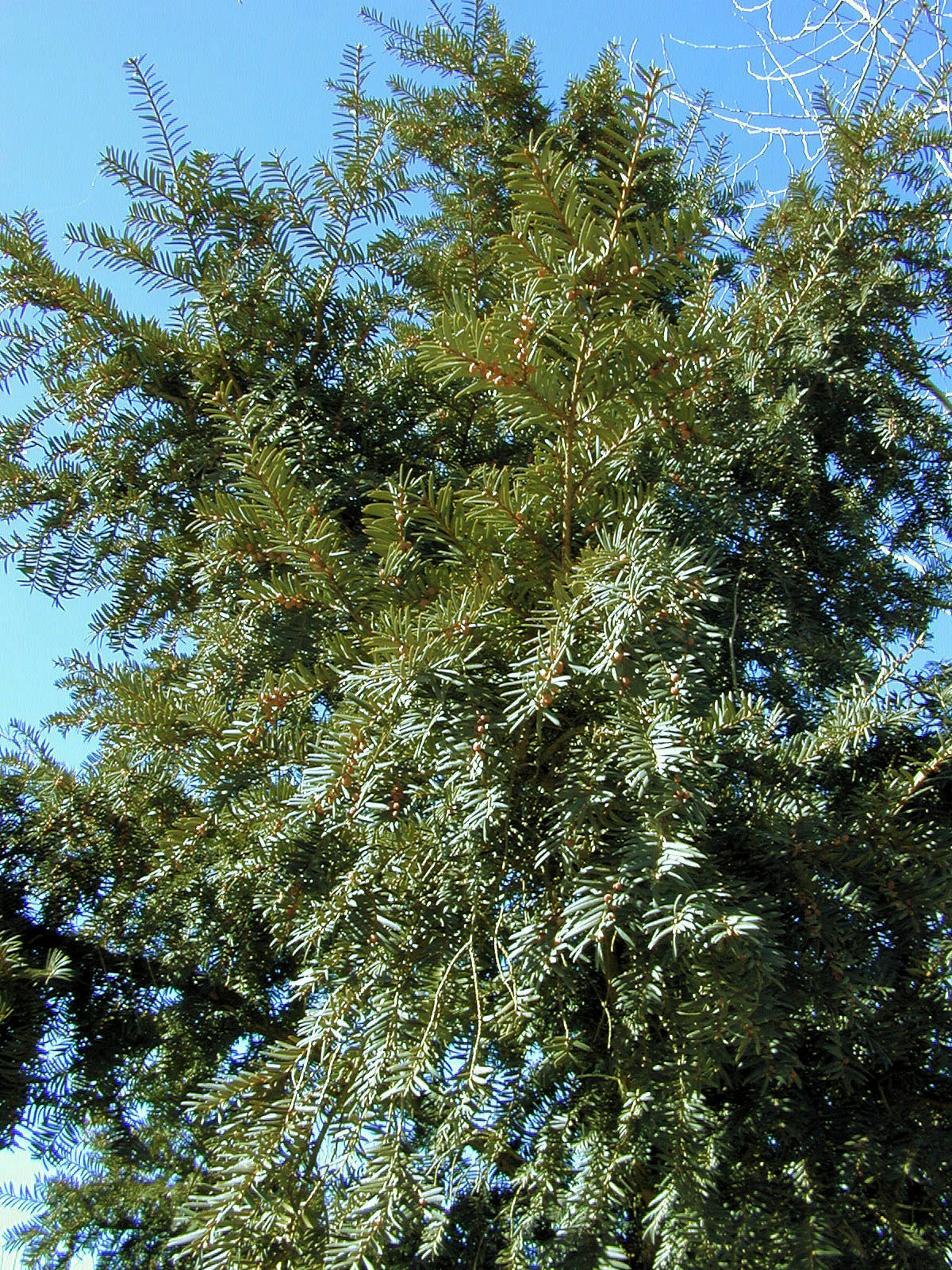 Taxus bacata